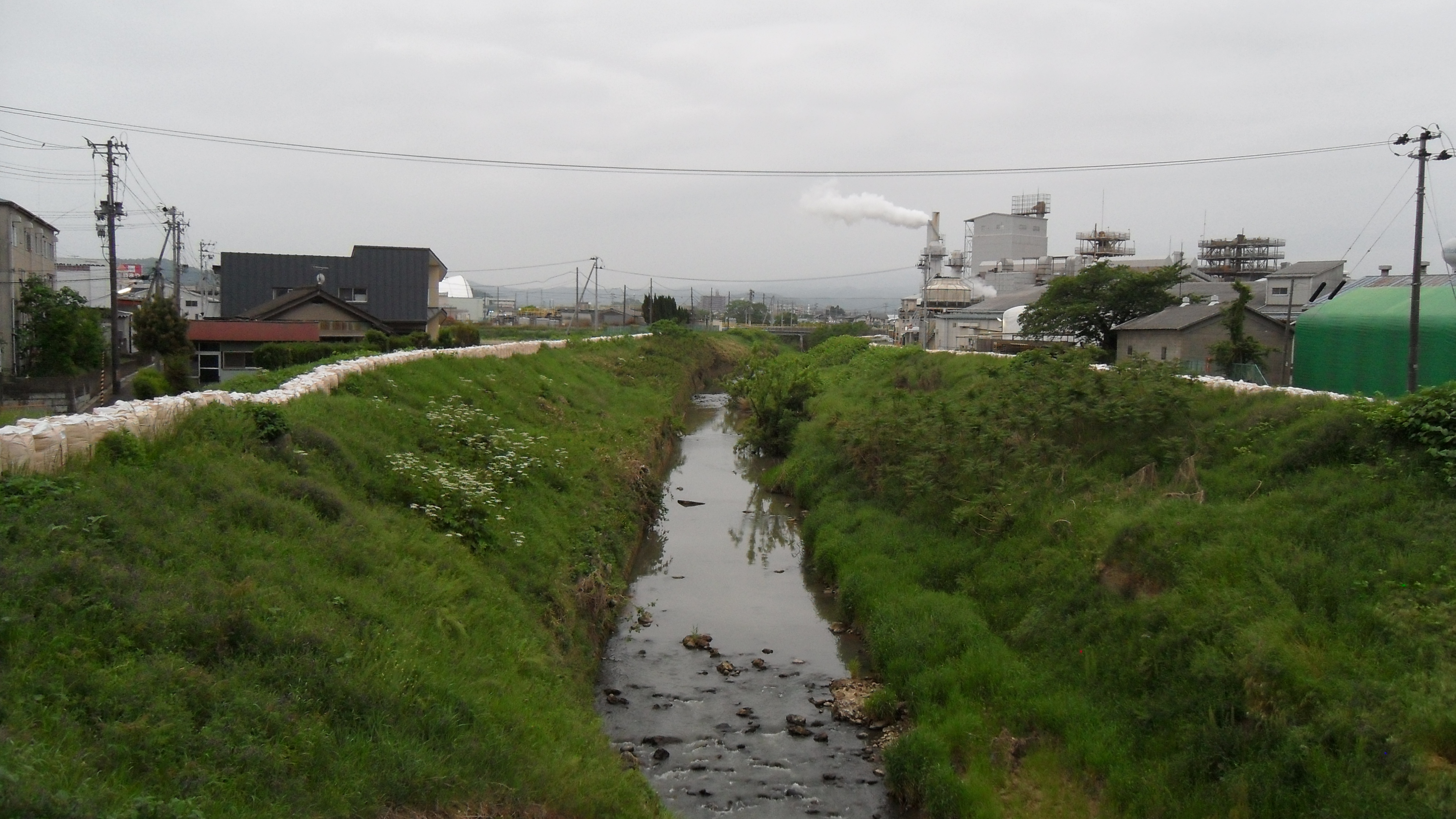 濁川橋から上流側を撮影